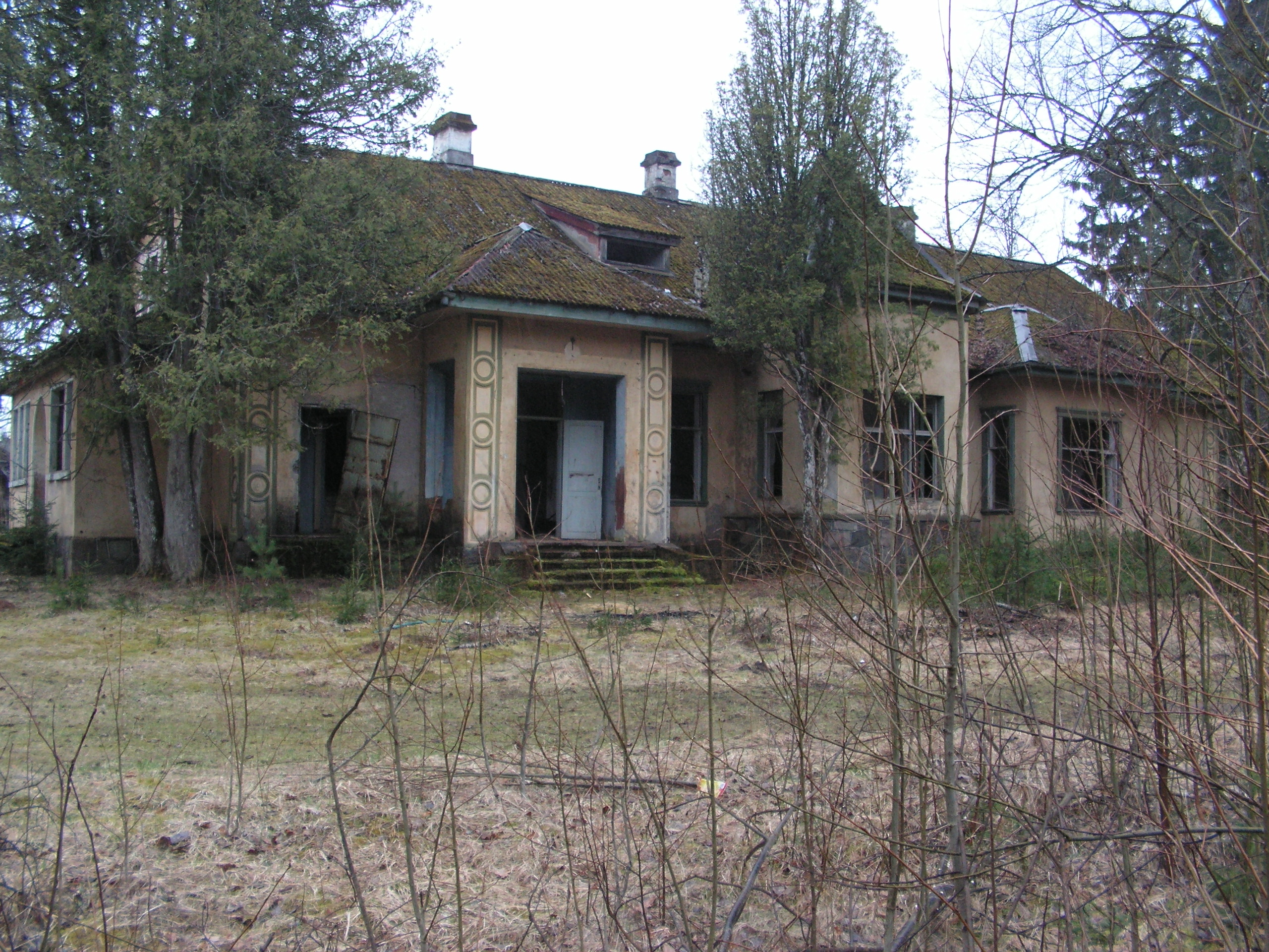 Abja linavabriku direktori elamu